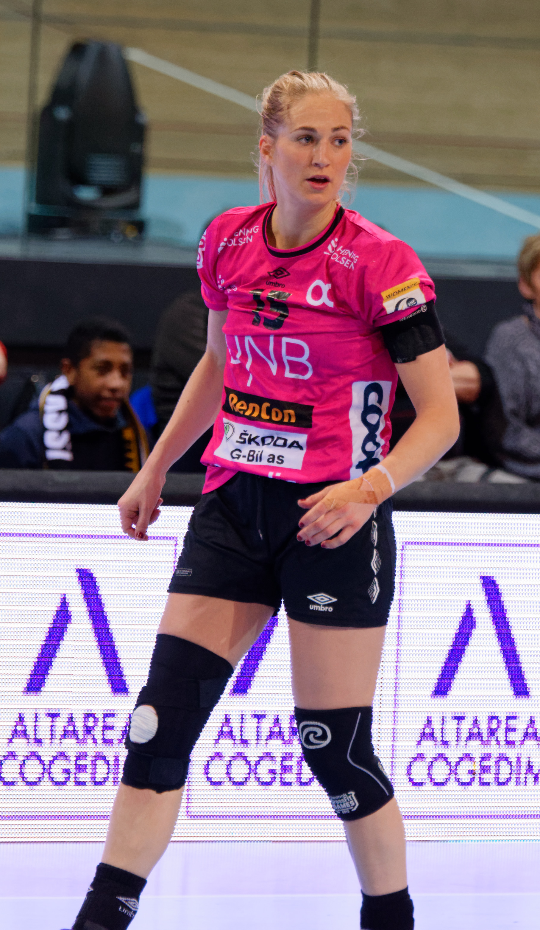 Rencontre du tour principal de coupe EHF entre Issy Paris Hand et les norvégiennes de Vipers Kristiansand au vélodrome de Saint-Quentin en Yvelines, le 03 février 2018.